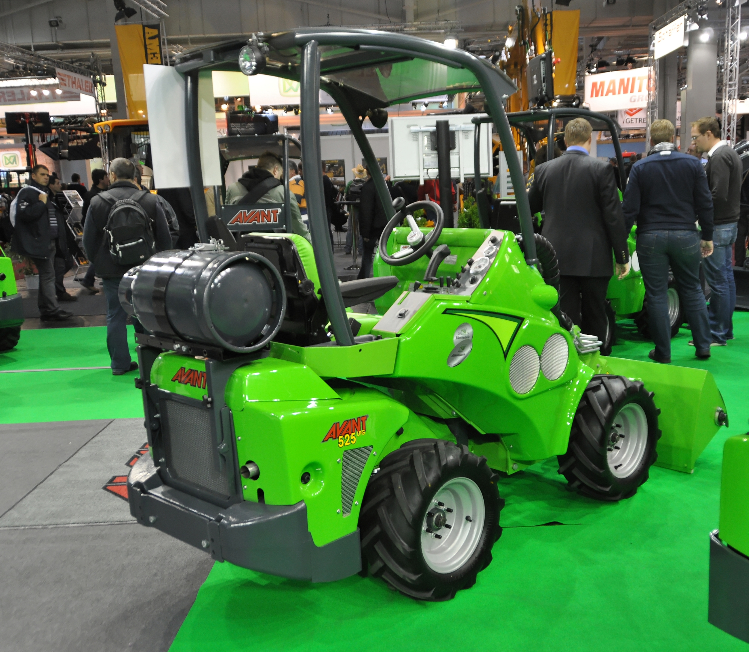 Bilder von der Agritechnica 2011 Dieses Foto entstand durch die Mithilfe der Wikimedia Deutschland e. V. bei der Akkreditierung als Fotograf. Wikimedia Deutschland e. V. hilft den Freiwilligen der Wikipedia bei der Erstellung von freien Inhalten.